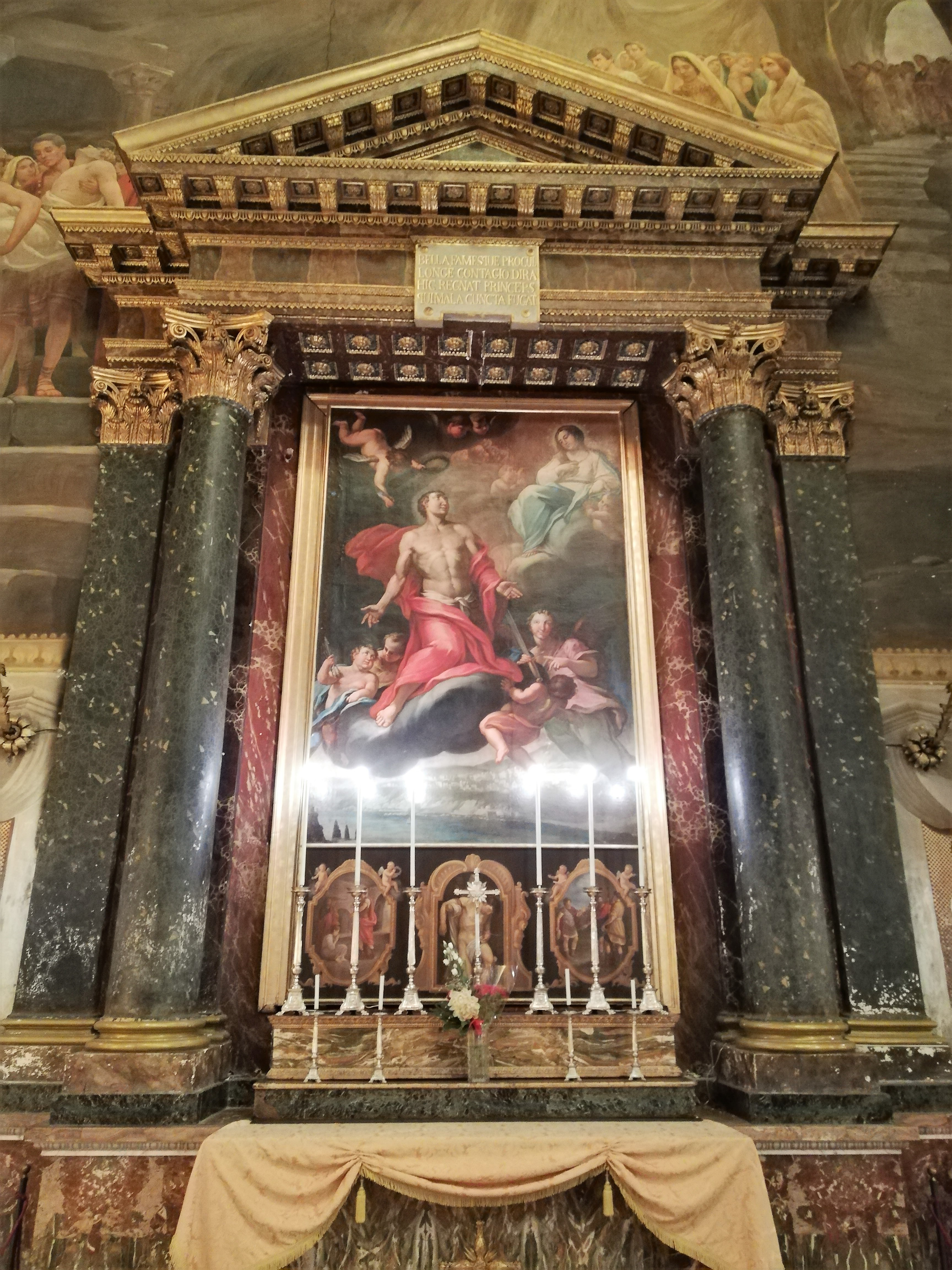 Dipinto.